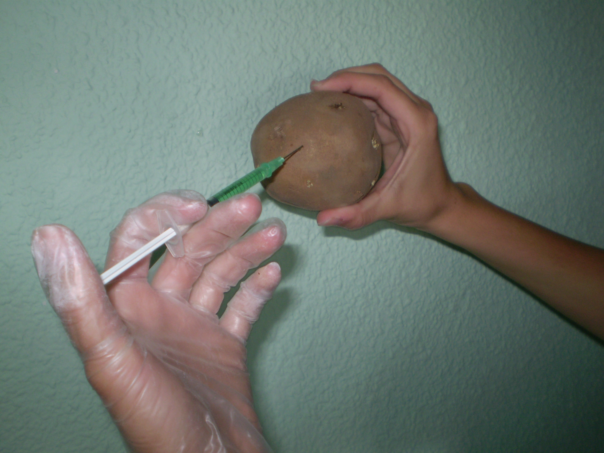 Alimento Transgénico